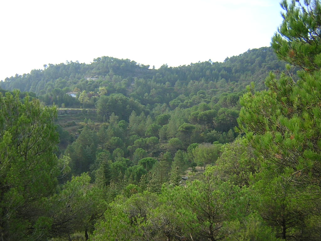 El torrent de la Baga del Coll de Portella (Monistrol de Calders, Moianès)